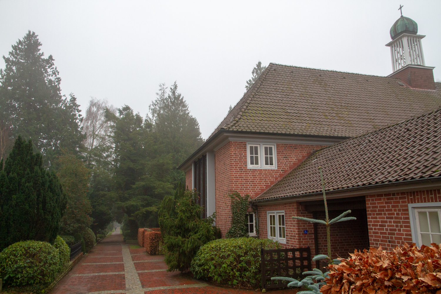 Neben der Kapelle am Vareler Friedhof befindet sich der Haupteingang zu selbigem